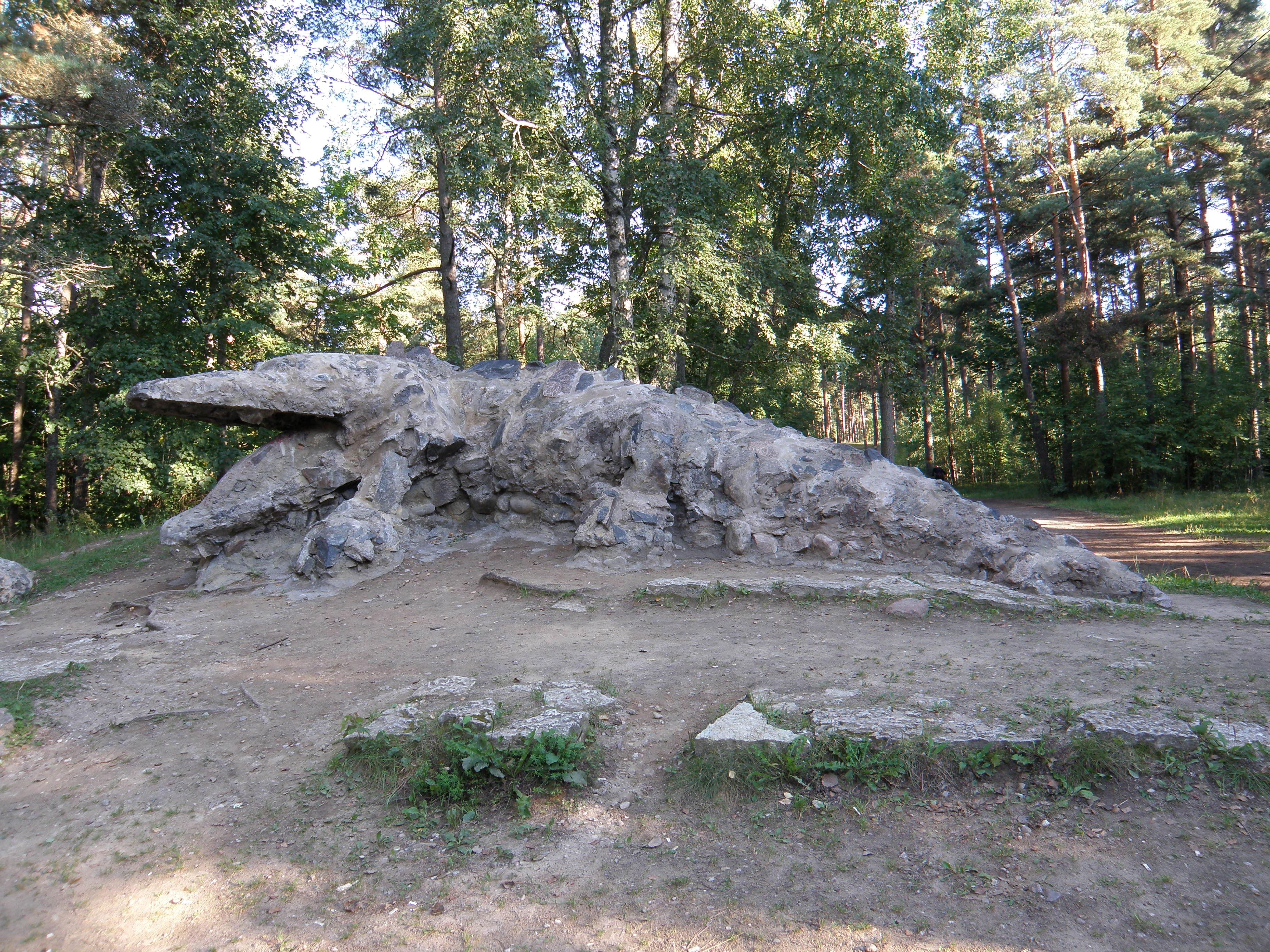 Glehni krokodill